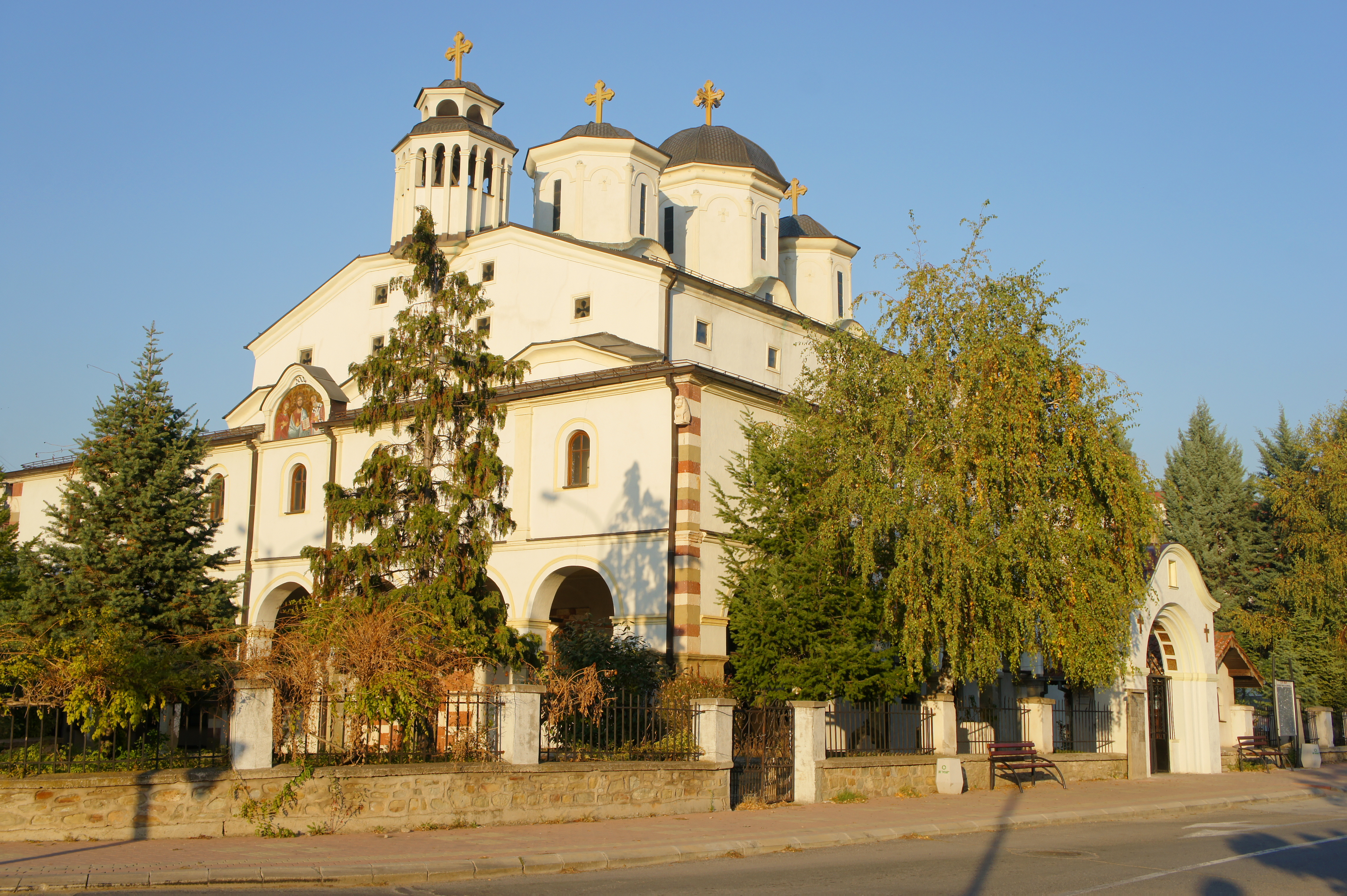 Црквата е изградена од Андреа Дамјанов на местото на постара црква од 1341 година и претставува симбол на градот.